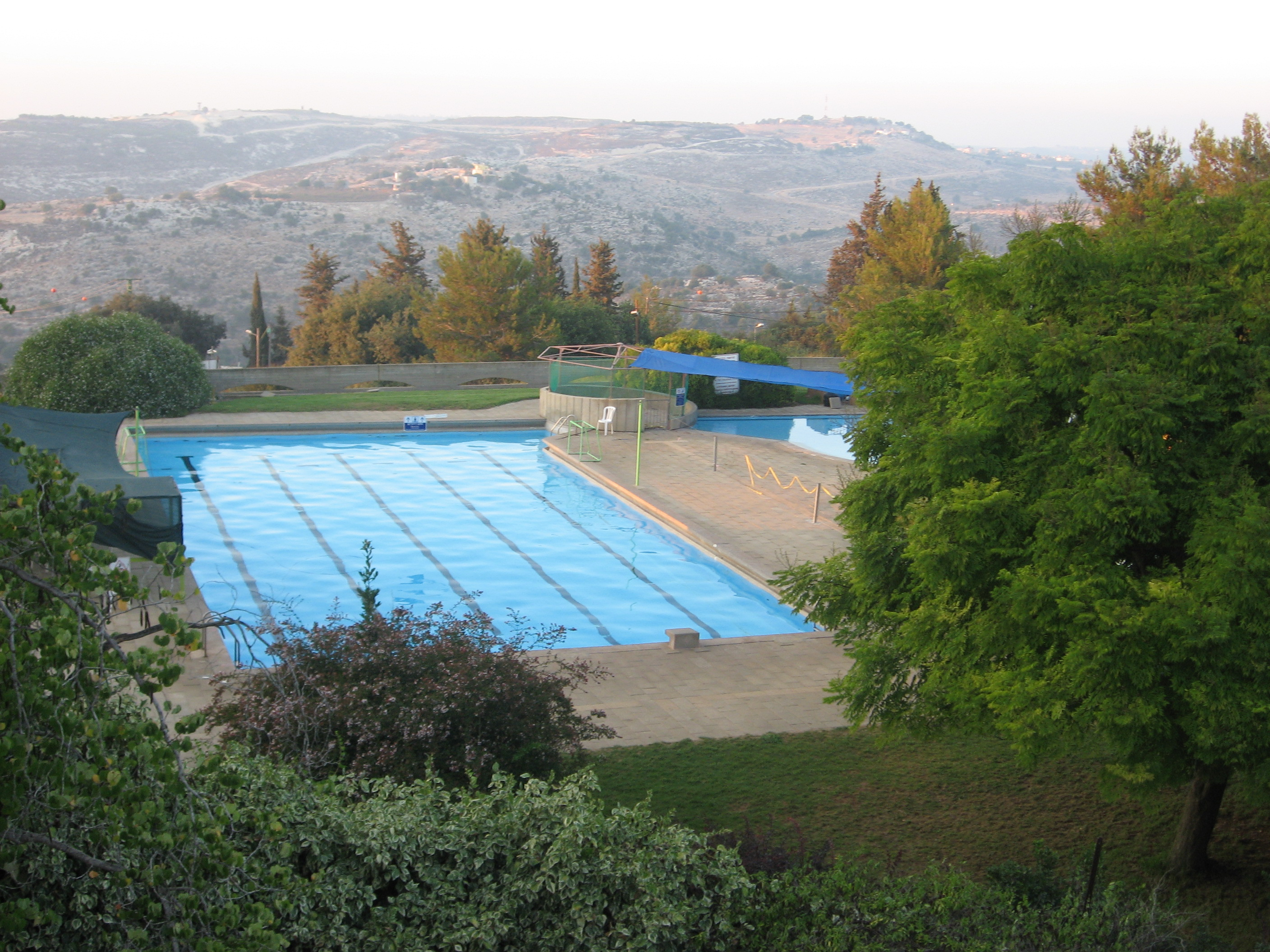 בריכת השחיה באדמית